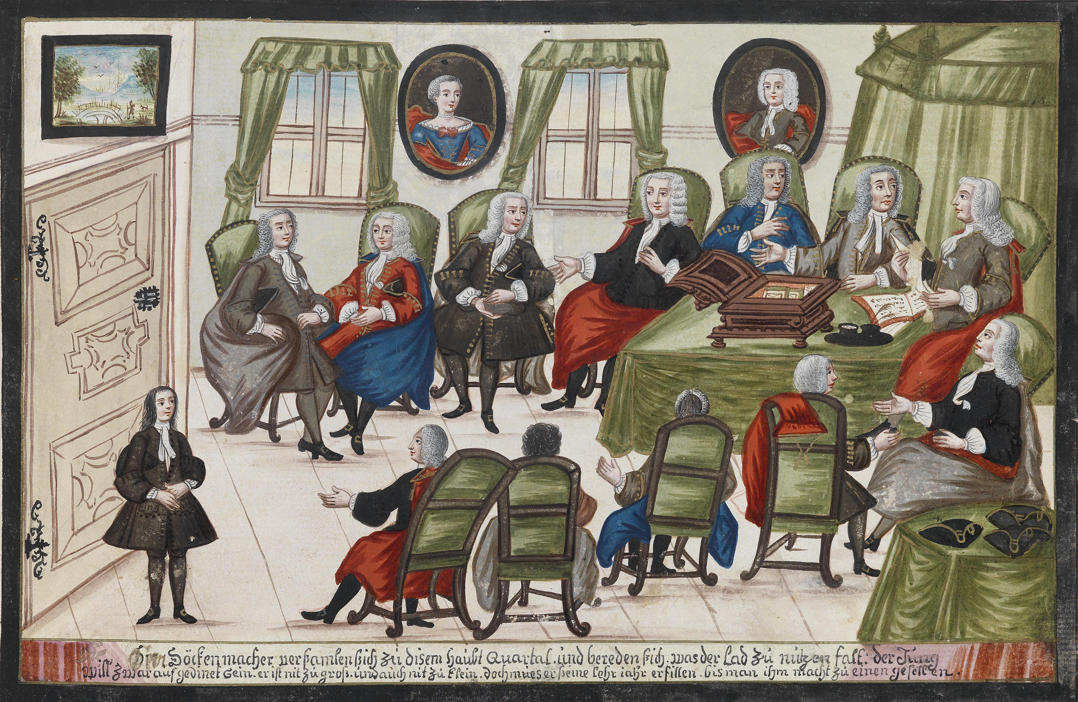 [Die] Döckenmacher verßamlen ßich zu disem Quartal und bereden ßich was der Lad zu nutzen falt: der Jung will zwar aufgedinet sein. er ist nit zu groß. und auch nit zu klein. doch mues er ßeine lehr iahr erfillen. bis man ihn macht zu einen gesellen (Versammlung der Mitglieder der Wiener Deckenmacherzunft); selbst gefertigte Seite aus dem Musterbuch und Privatalbum des Wiener Deckenmacher-Gesellen Johann Franz Hörmannsperger, 1736